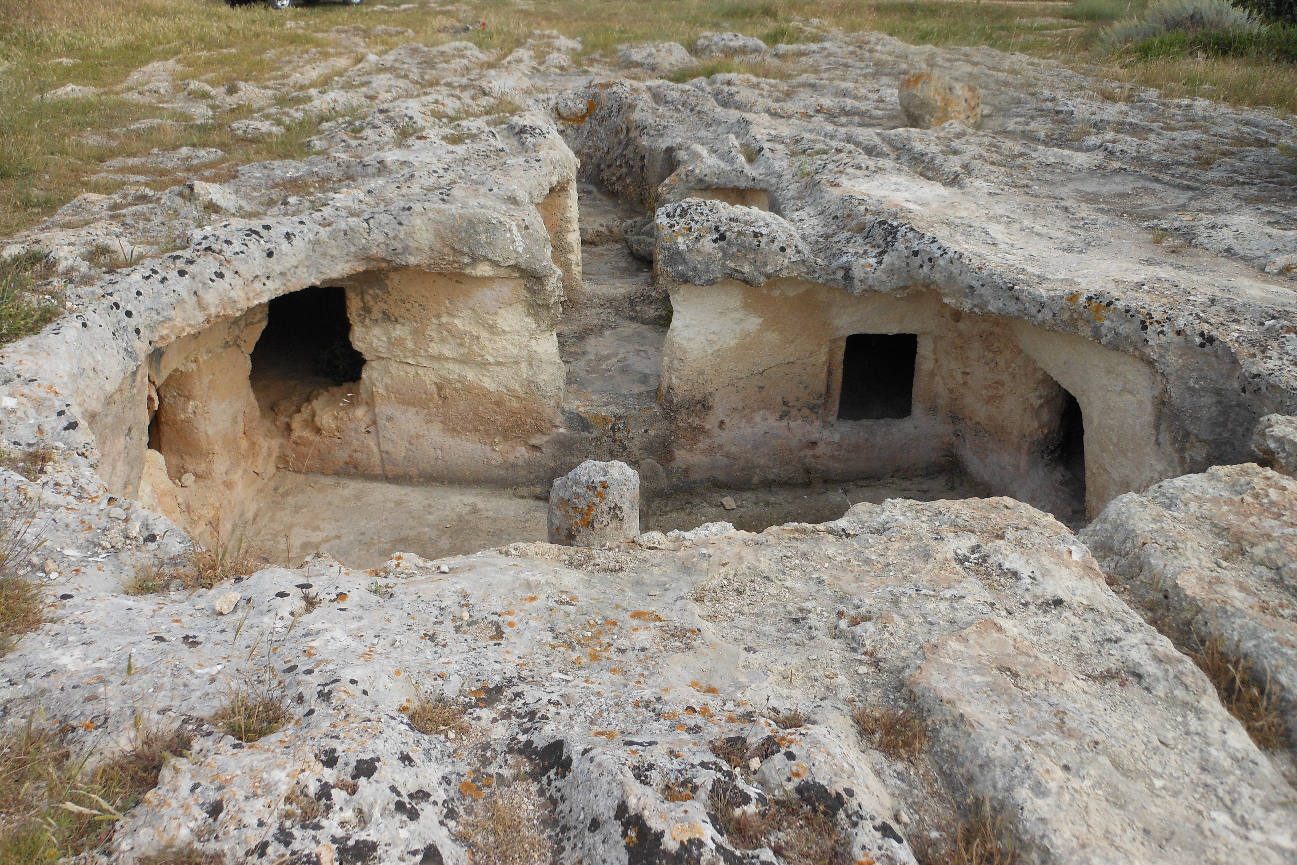 Porto Torres - Necropoli ipogeica di Su Crucifissu Mannu